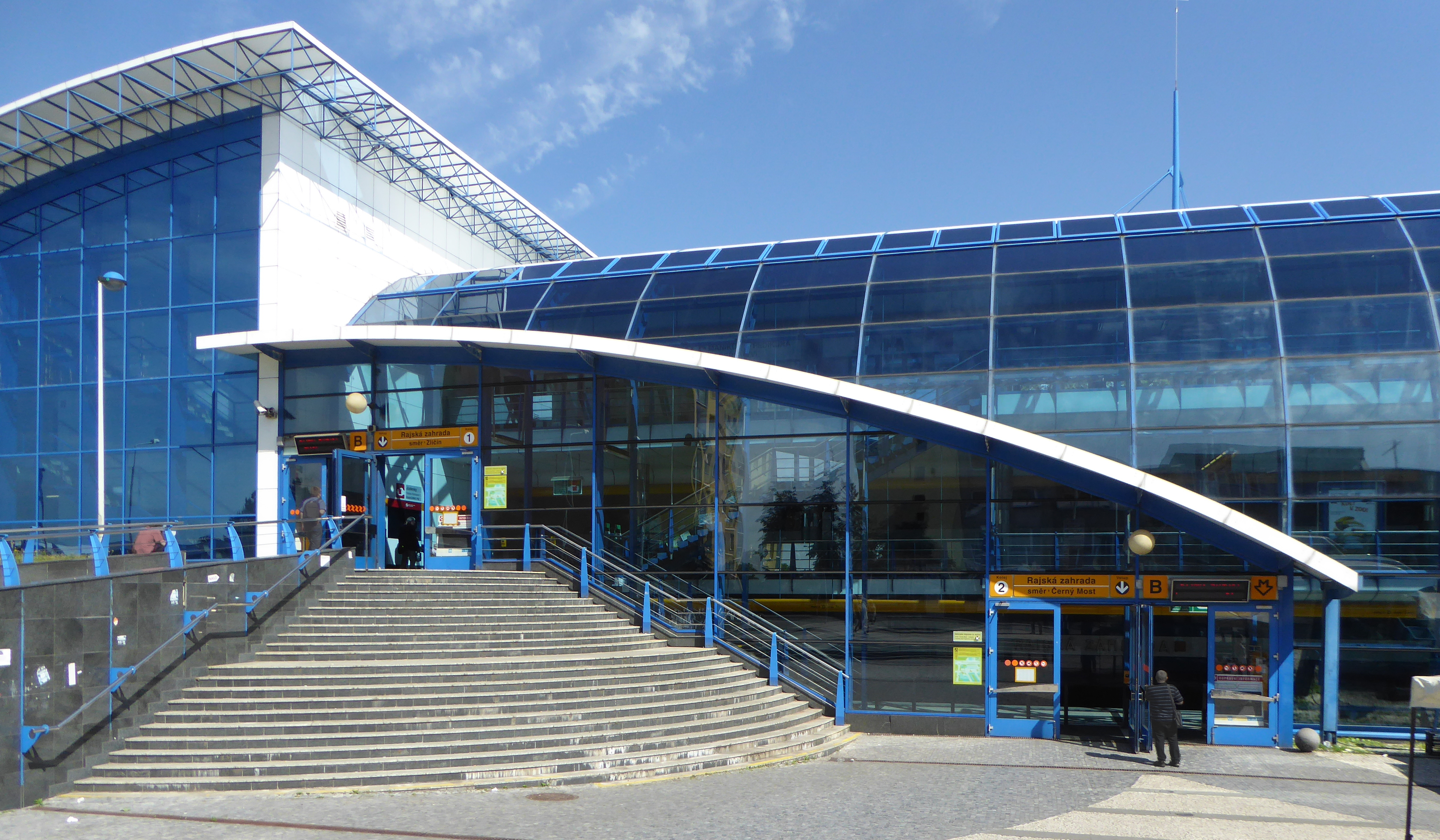 Západní vchod stanice metra Rajská zahrada v Praze. Nahoře jezdí vlaky do centra, dole v opačném směru.